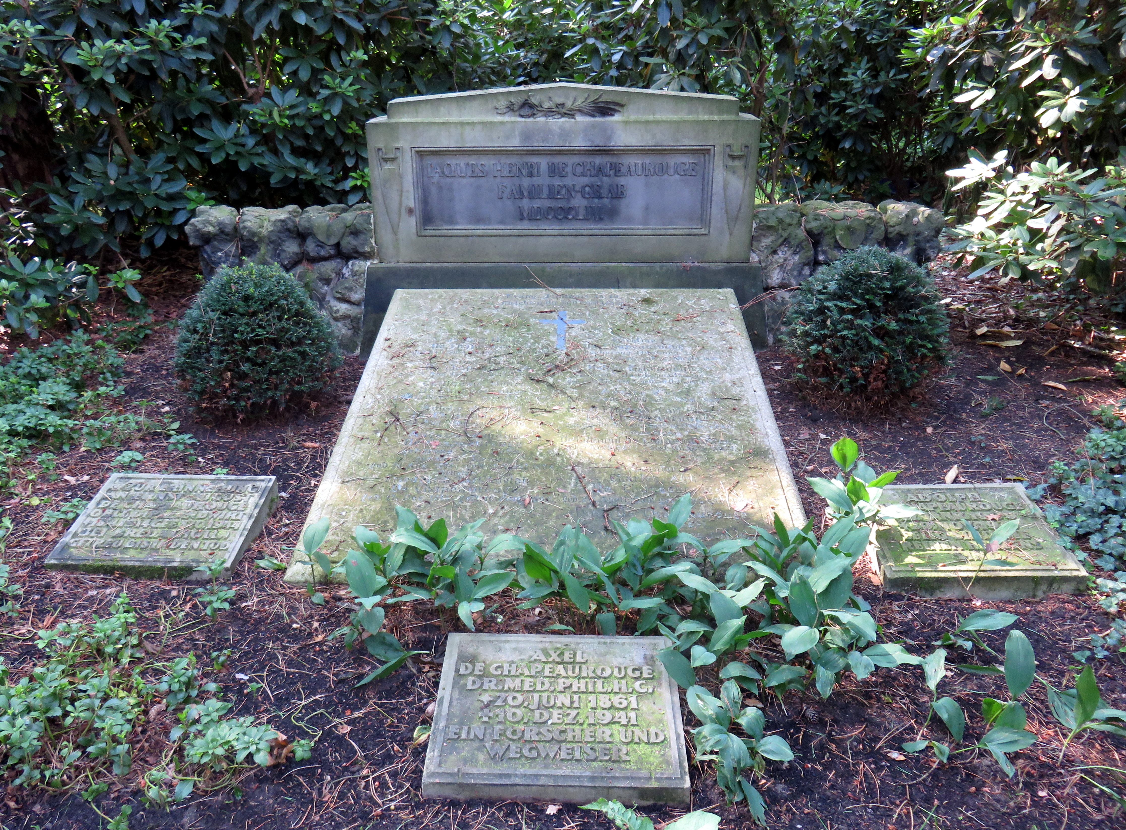 Grabstätte mit Gedenkstein (1854) und Sammelgrabplatte für die älteren Generationen der Hamburger Familie Jacques Henri (wie Frédéric (Friedrich), Edmund, Charles Ami) de Chapeaurouge sowie einzelnen Kissensteinen für deren Nachfahren (wie Paul, Axel, Alfred Dauphin).Die Anlage befindet sich auf dem Hamburger Friedhof Ohlsdorf, Planquadrat Q 25 (nördlich Wasserturm).Inschriften bei fredriks.de.